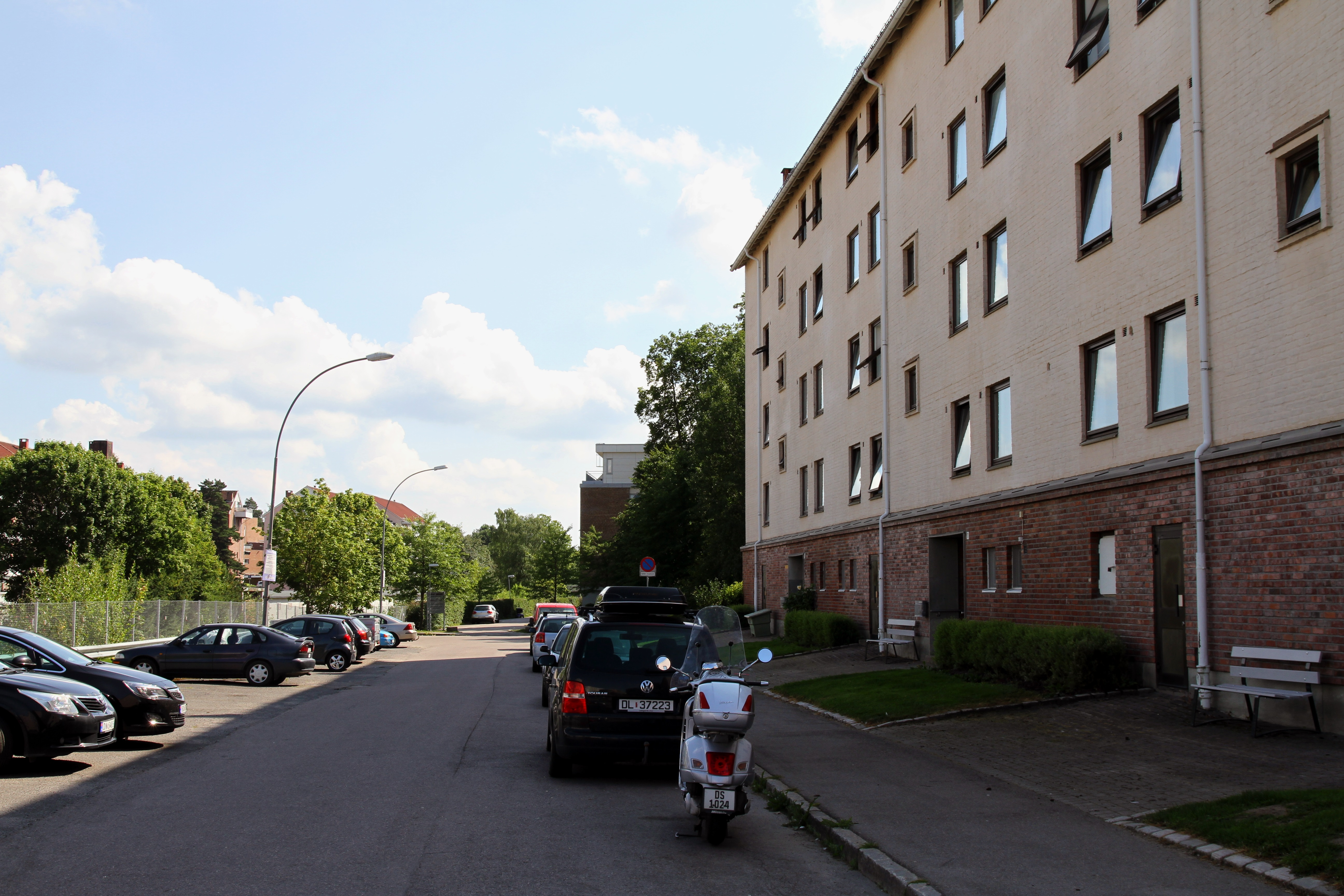 Gamlehagen i Oslo.